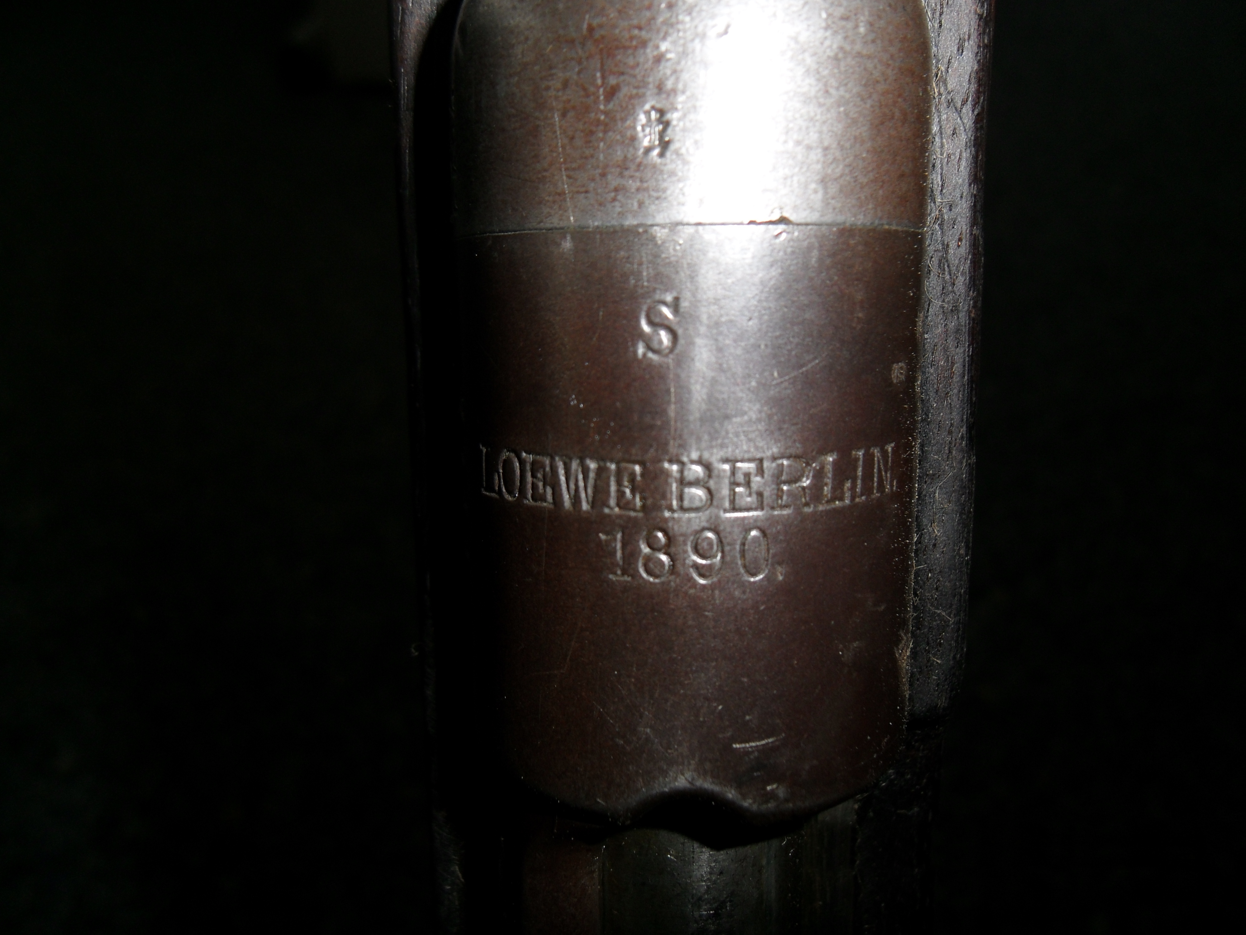 Patronenlager des Gewehr88 mit eingeschlagenem "S" und dem Hersteller "Loewe Berlin"